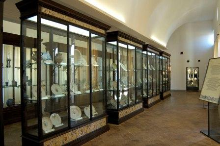 Collezione Magnini nel Museo regionale della ceramica di Deruta